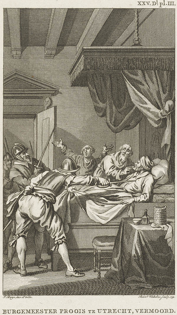 Moord op de Utrechtse burgemeester Proys in 1425 door leden van het Vleeshouwersgilde